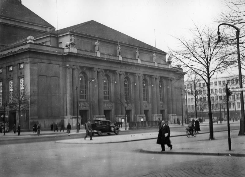 Berlin - Charlottenburg Städtische Oper vor der Zerstörung